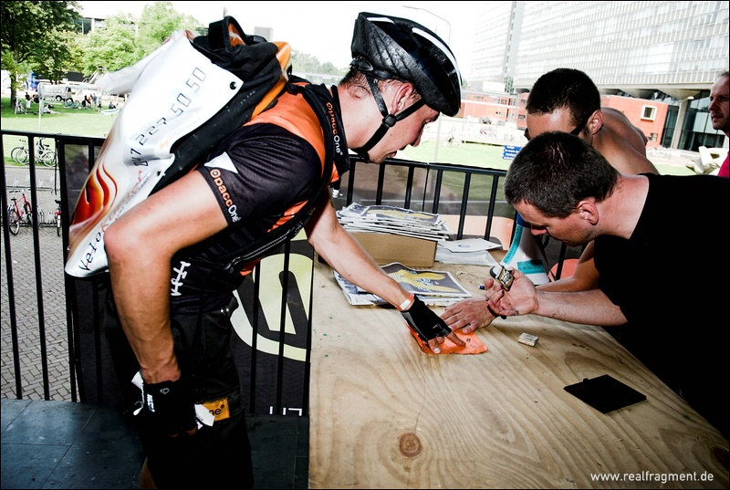 Hauptrennen ('Main race') während der CMWC (Cycle Messenger World Championship) 2008 in Eindhoven, Niederlande